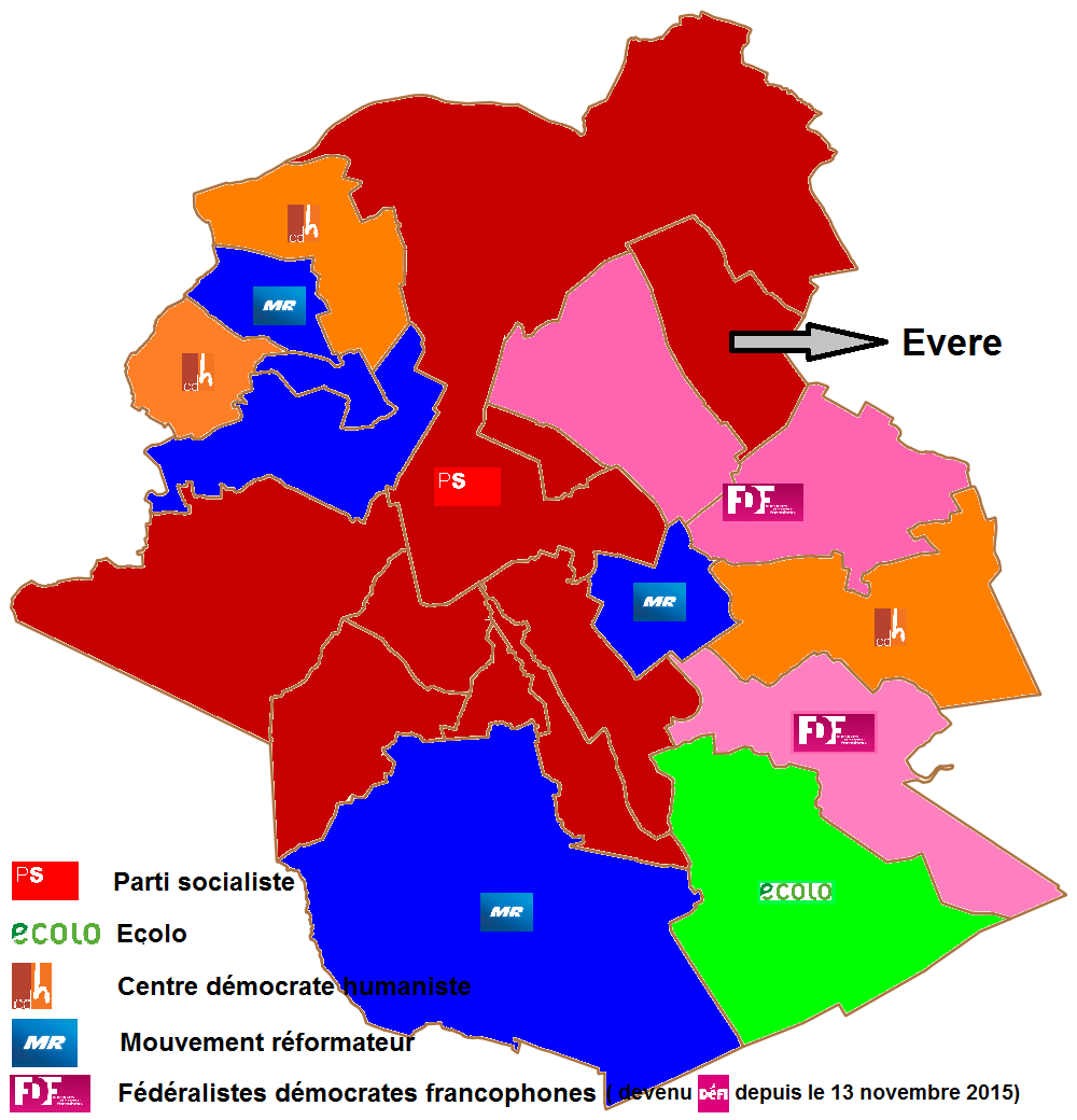 Localisation d'Evere sur la carte d'appartenance politique des bourgmestres de la Région de Bruxelles-Capitale suite à l'élection communale de 2012